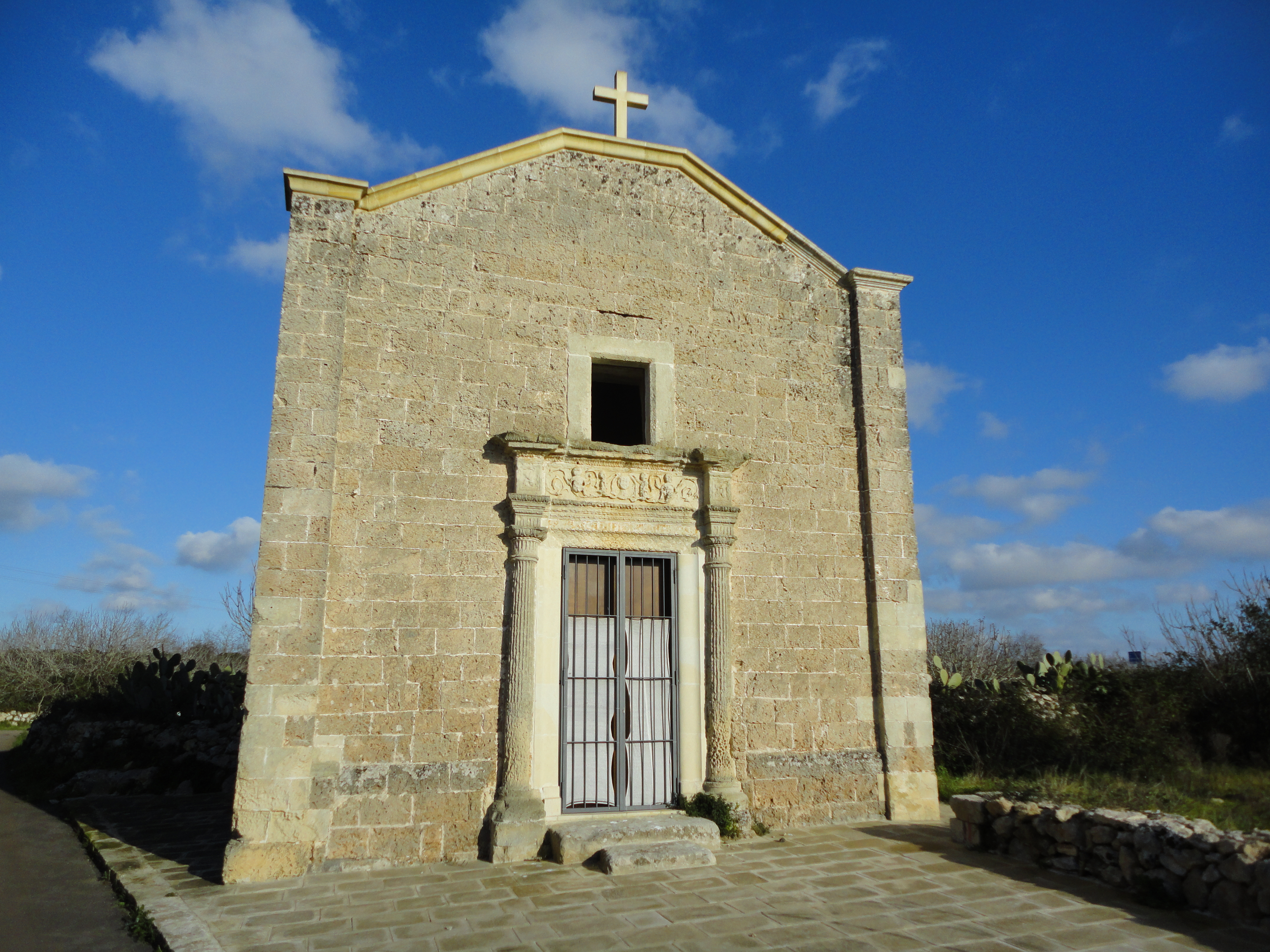 Chiesa Madonna dei Farauli Sternatia, Lecce